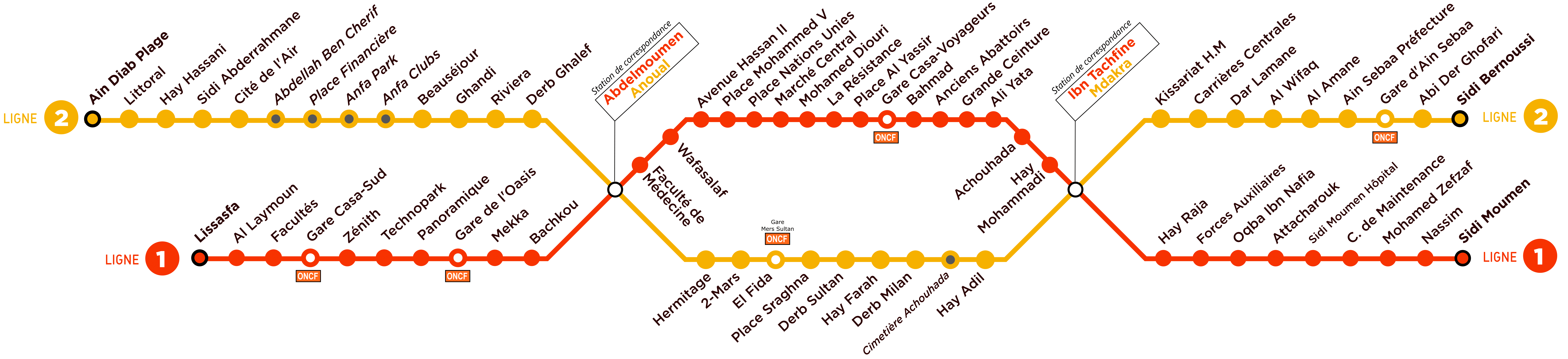 Linien T1 und T2 der Tram von Casablanca